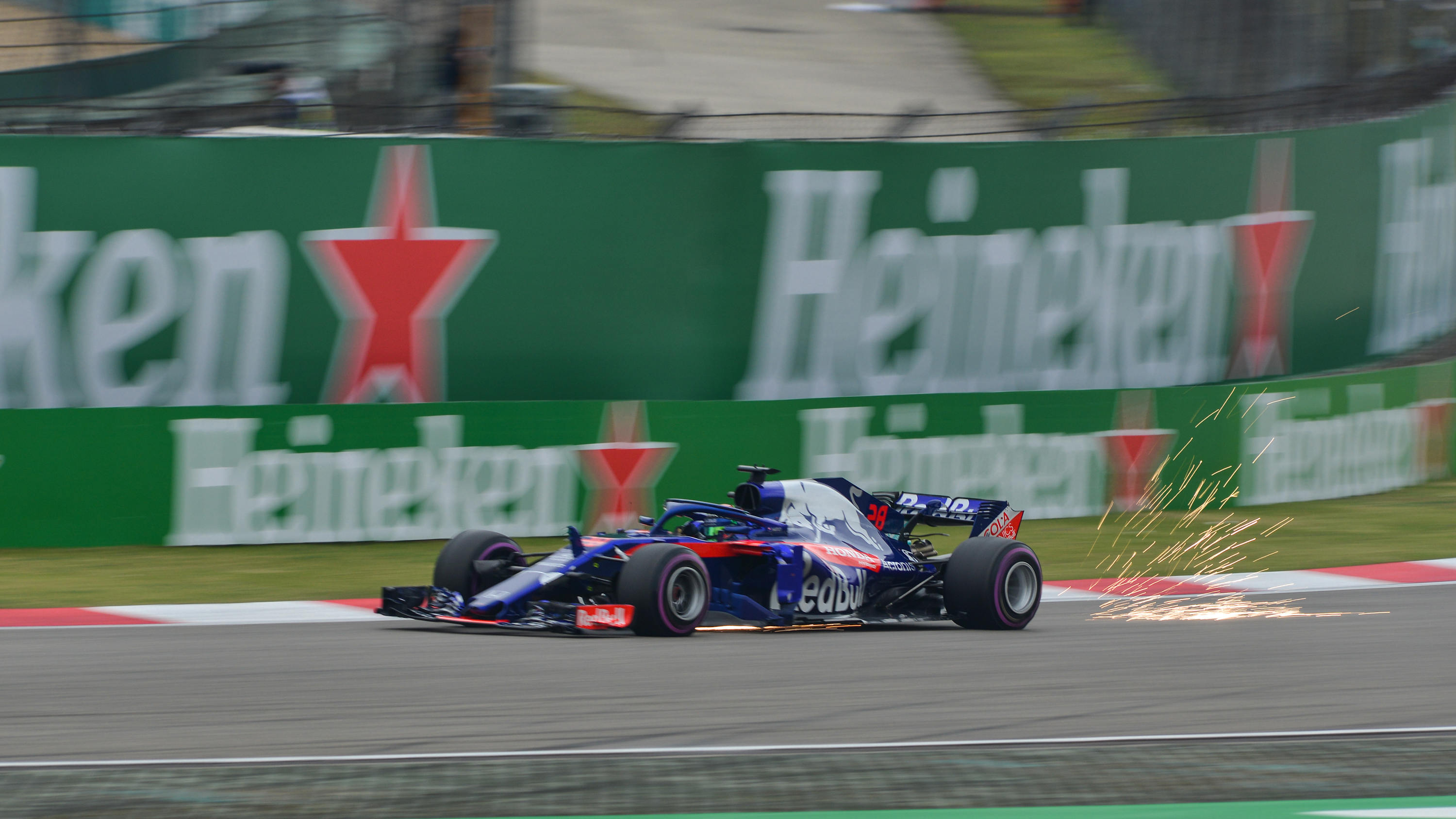 Scuderia Toro Rosso Honda